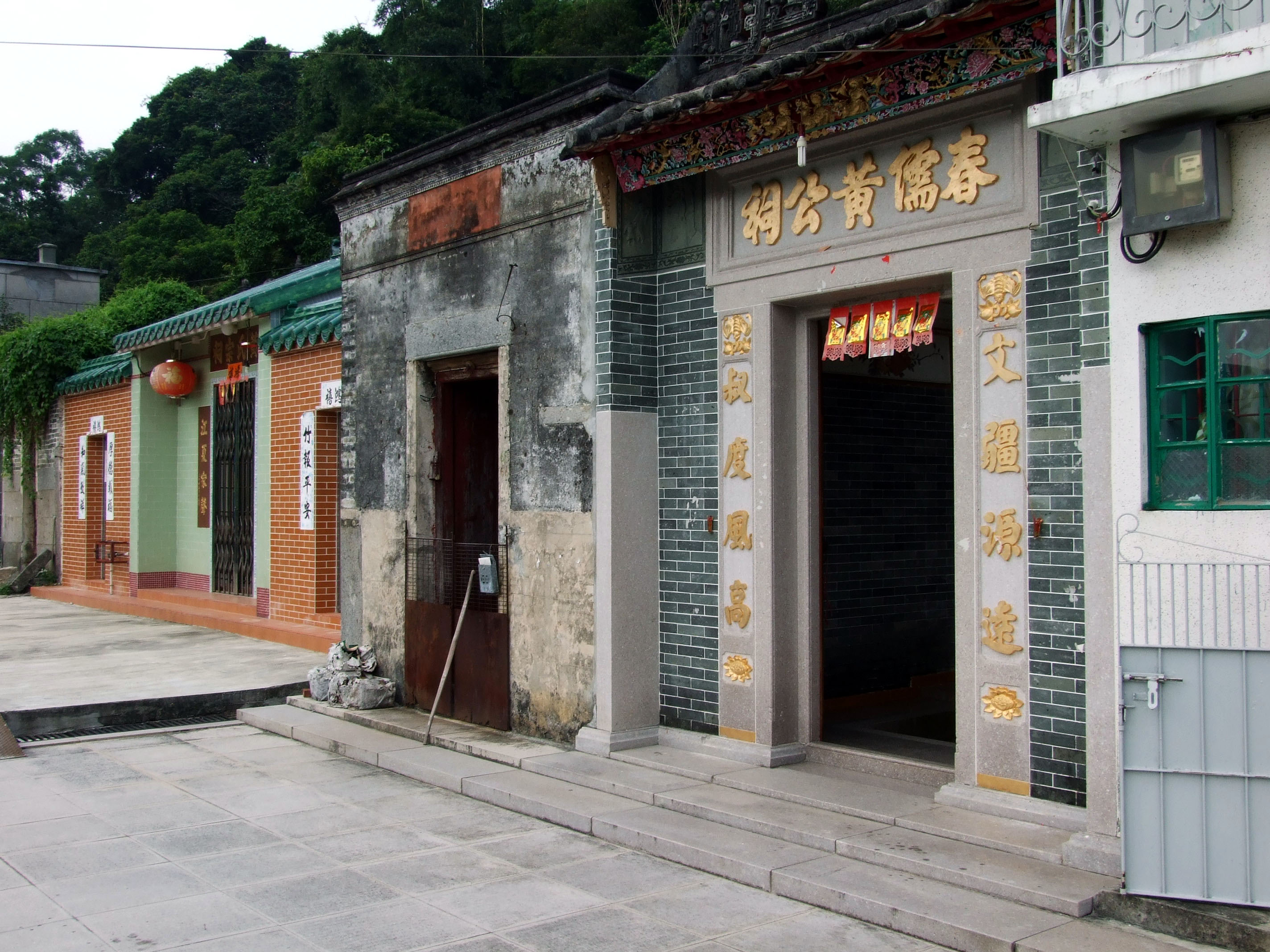 中文（香港）: 春儒黃公祠